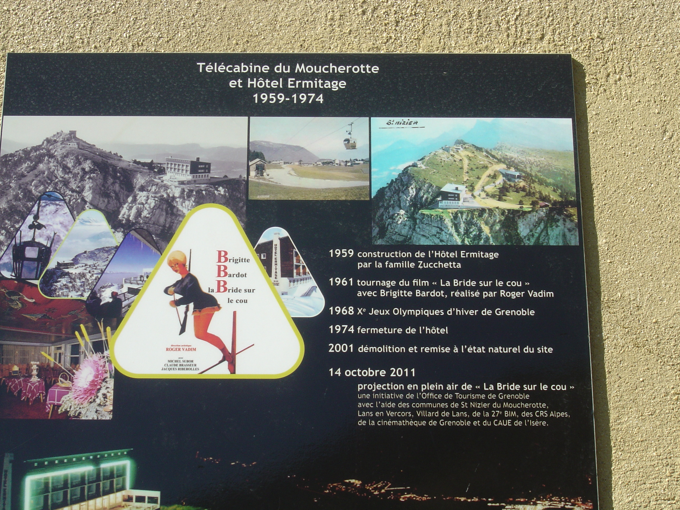 Non loin du sommet du Moucherotte, une plaque explique quelques détails sur l'ancien hôtel du Moucherotte ainsi que le film anciennement tourné sur les lieux.